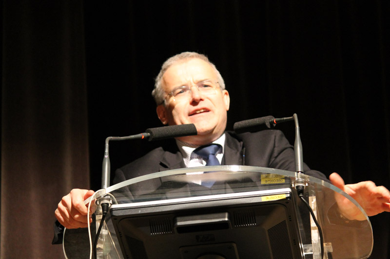 Michel Dantin, Député européen